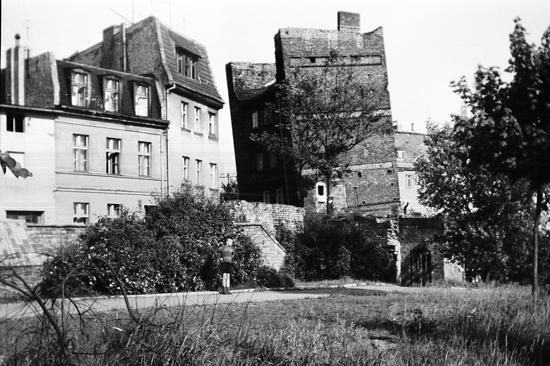 krzywa kamienica w Toruniu